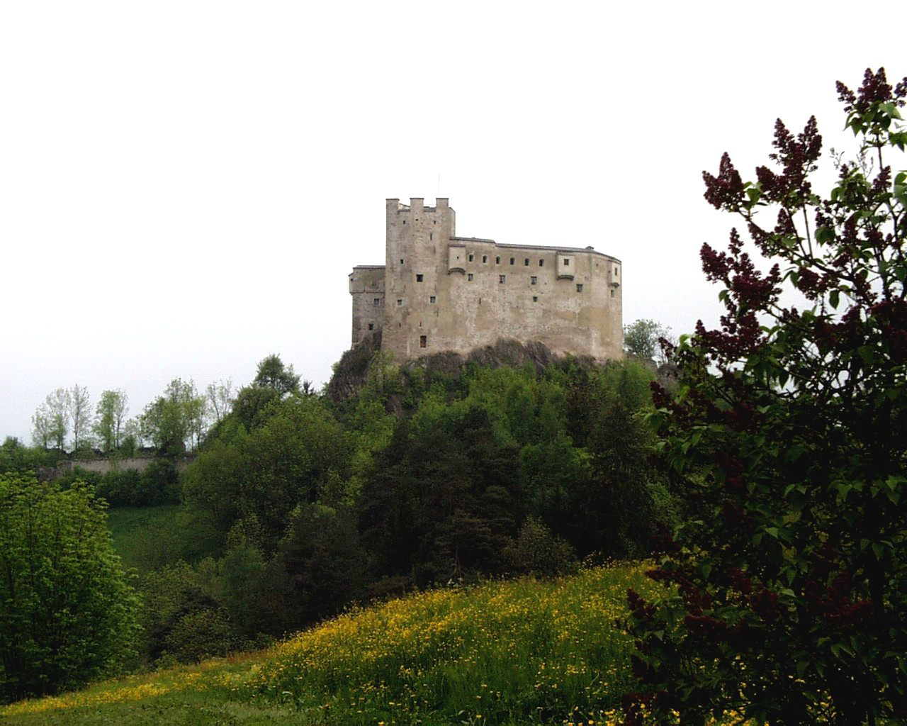 Michlsburg bzw. Michelsburg (Moos bei St. Lorenzen, Südtirol)